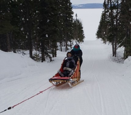 Es gibt sehr verschiedene Arten von Hundeschlitten, dieses Modell zeigt einen in Ost-Kanada gebräuchlichen zum Transport von 2 Personen